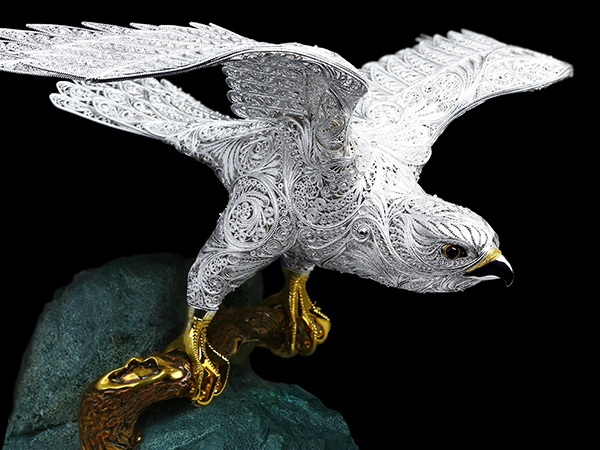 сокол, серебряная проволока, скань